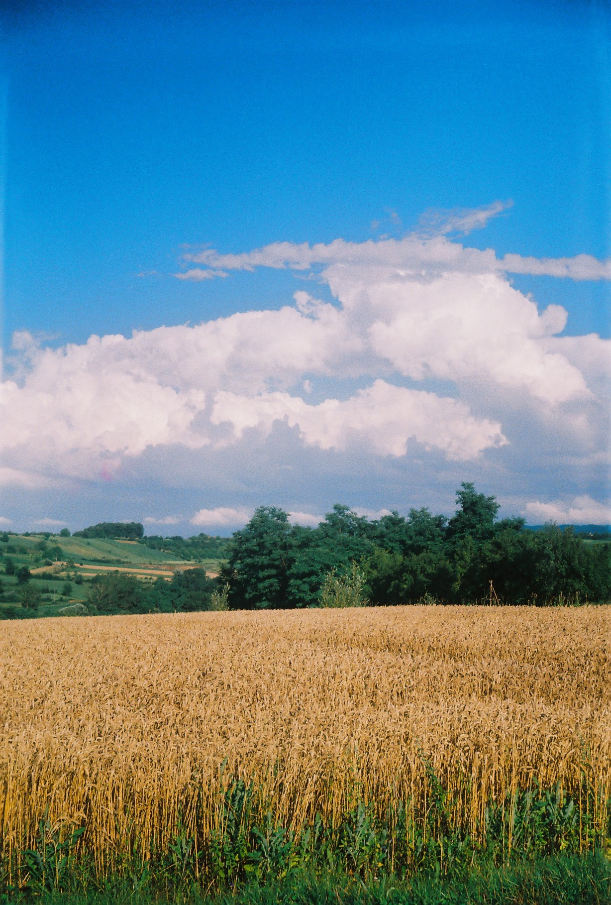 Đurić S.Marko